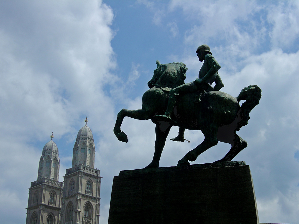 Statue von Hans Waldmann von Hermann Haller mit den Türmen des Grossmünsters in Zürich